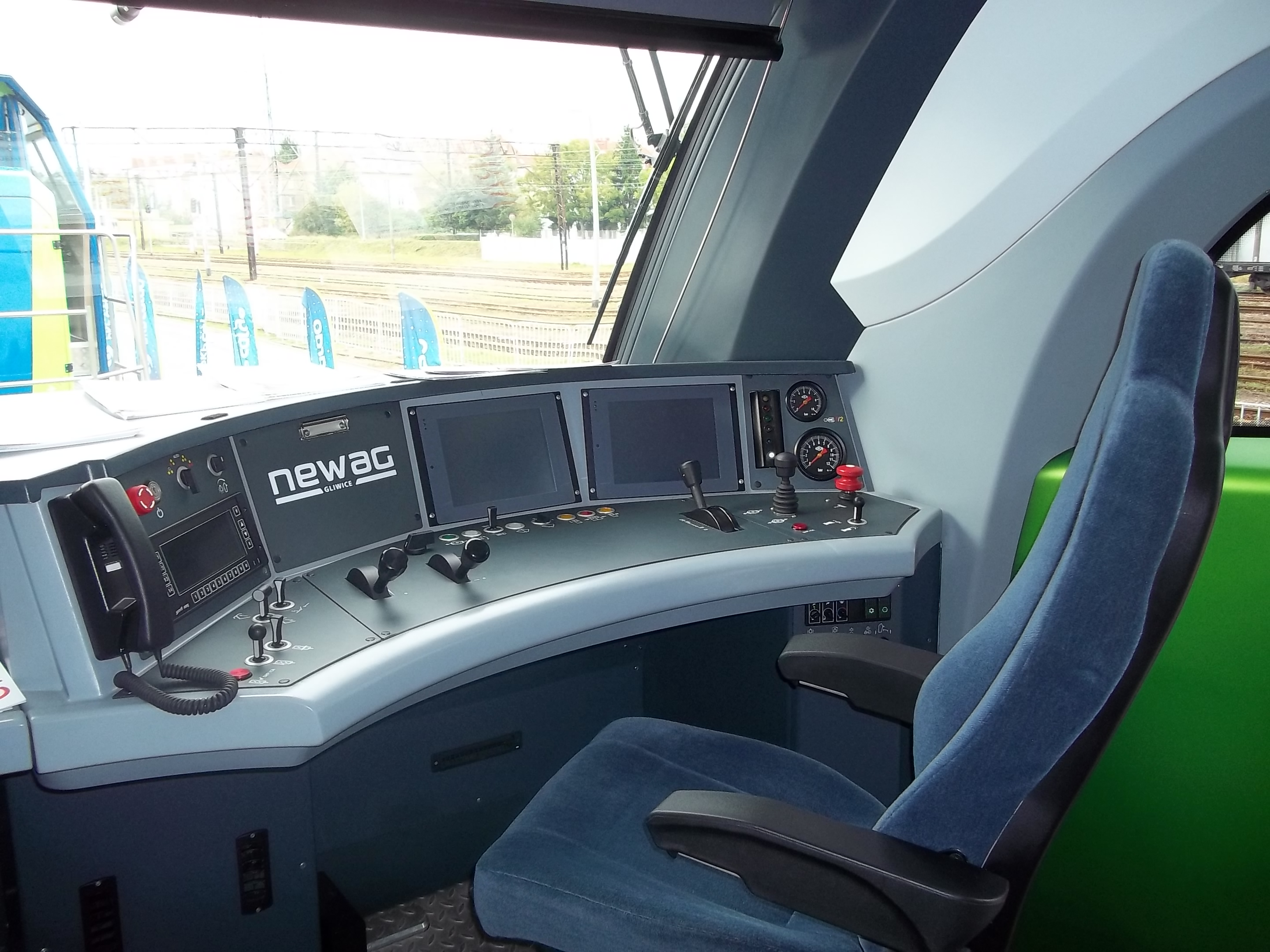 Czteroosiowa lokomotywa elektryczna Newag E4MSU-001 "Griffin" - wnętrze kabiny.